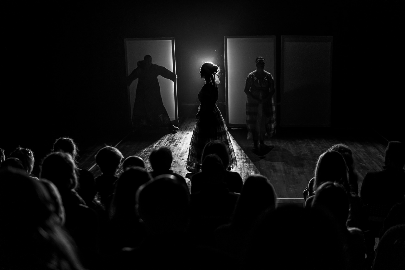 Pilt lavastusest "Mida talle öelda ehk tigu".